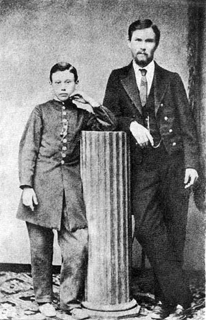 Іван Тобілевич (Іван Карпенко-Карий) та учень Херсонської гімназії Микола Тобілевич (Микола Садовський). Херсон